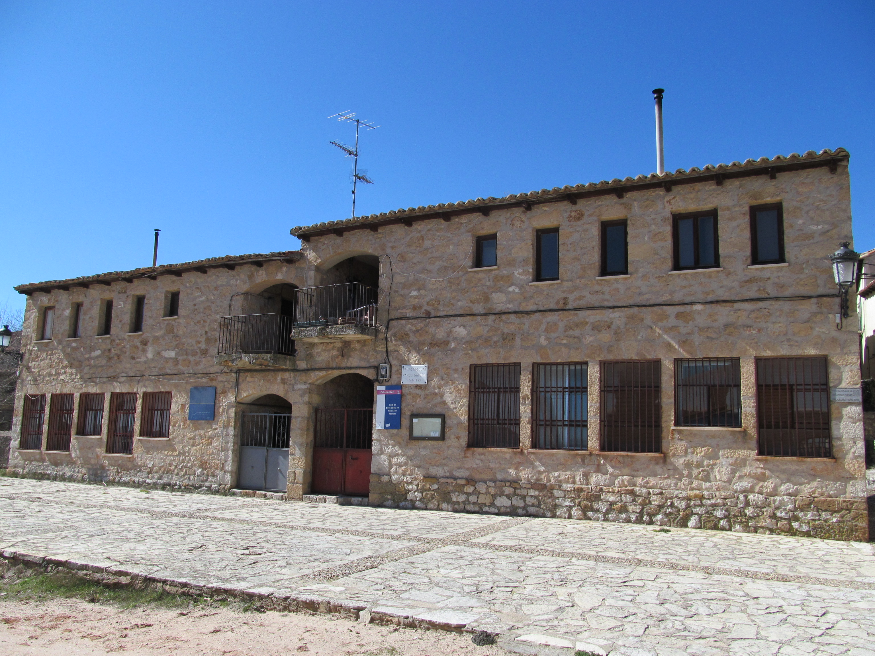 Atienza-Grupo escolar para mayores